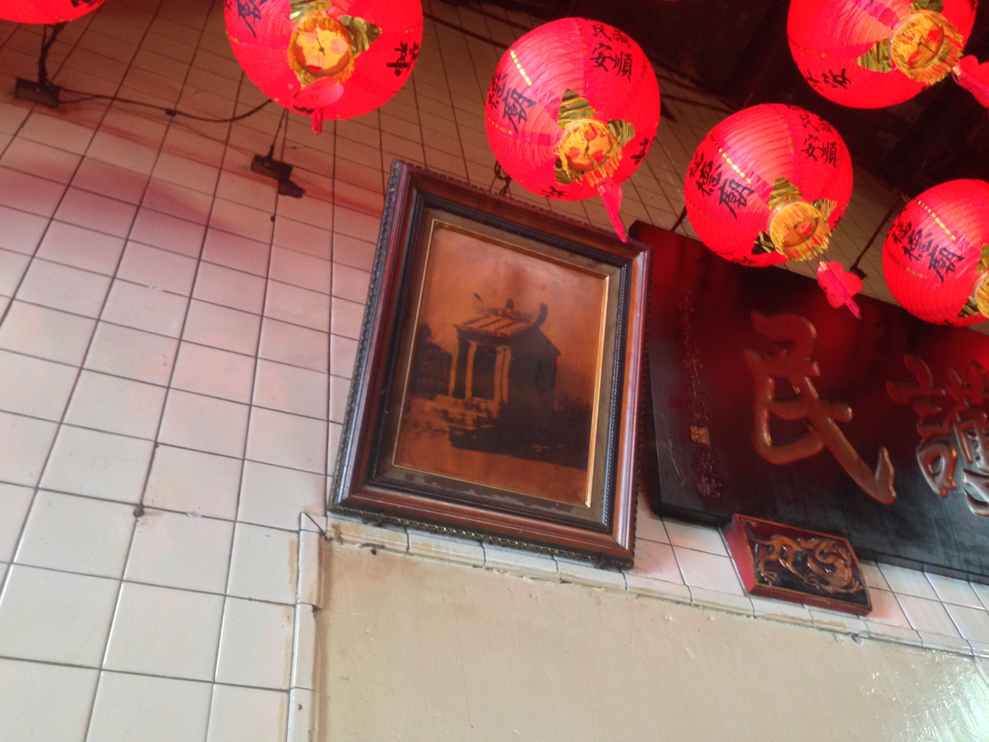 美城福德廟舊廟照片